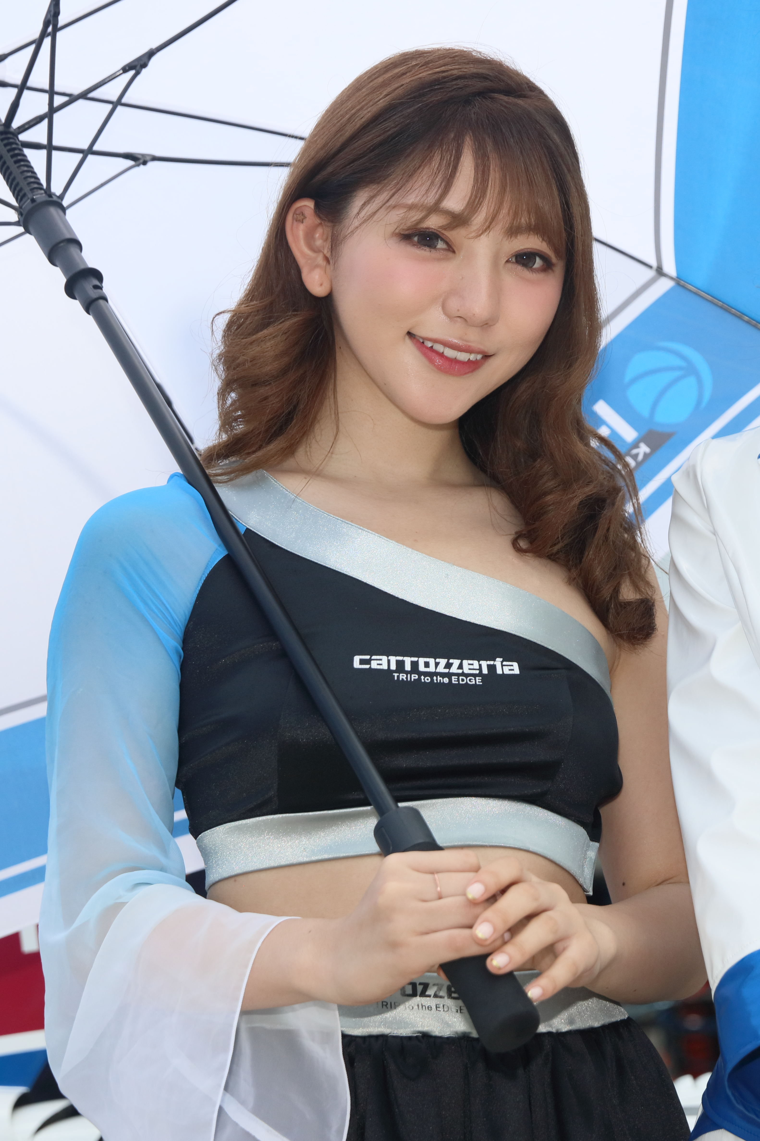 2018年5月スポーツランドSUGOにて